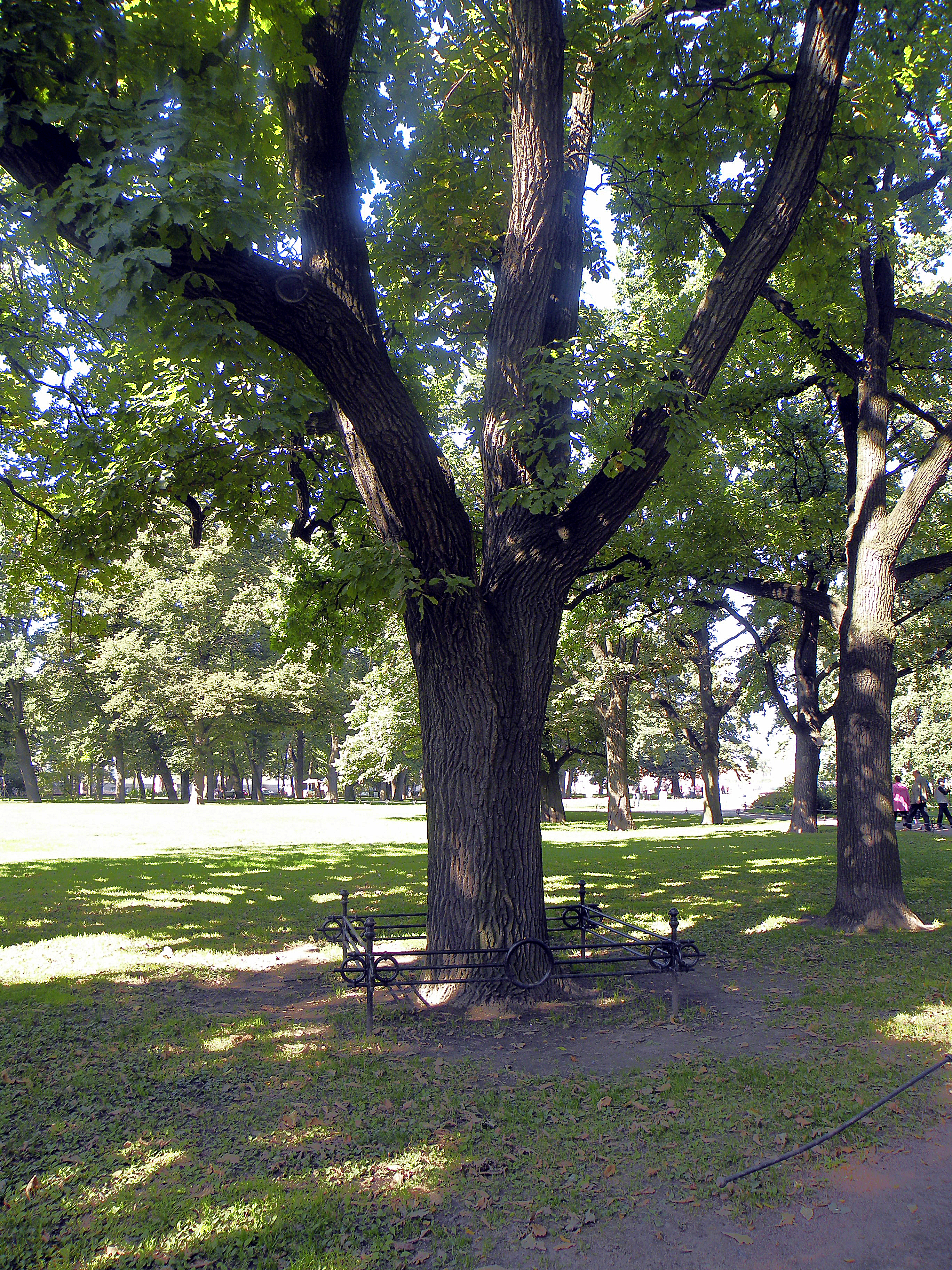 Дуб Александра II в Александровском саду СПб. По данным книги:Ротиков К.К. Другой Петербург. – СПб., «Лига Плюс» -640 с. ISBN 5-88663-009-0